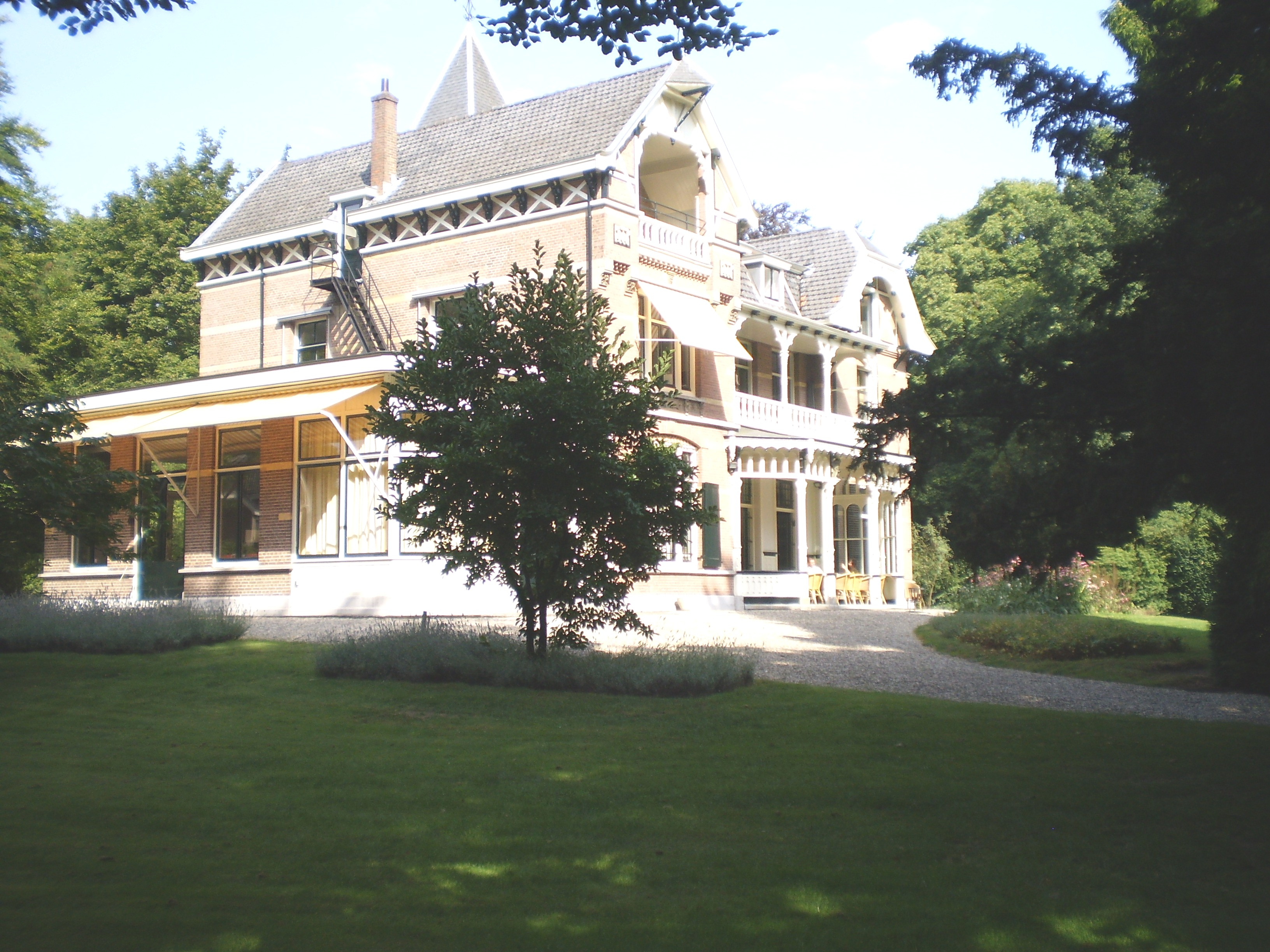 foto oanbean troch Swarte Kees op 18 augustus 2009